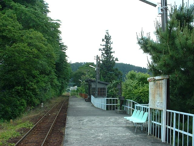 二俣本町駅